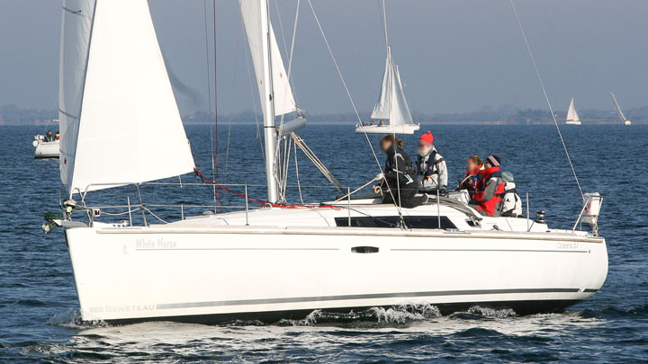 Oceanis 37 unter Segeln